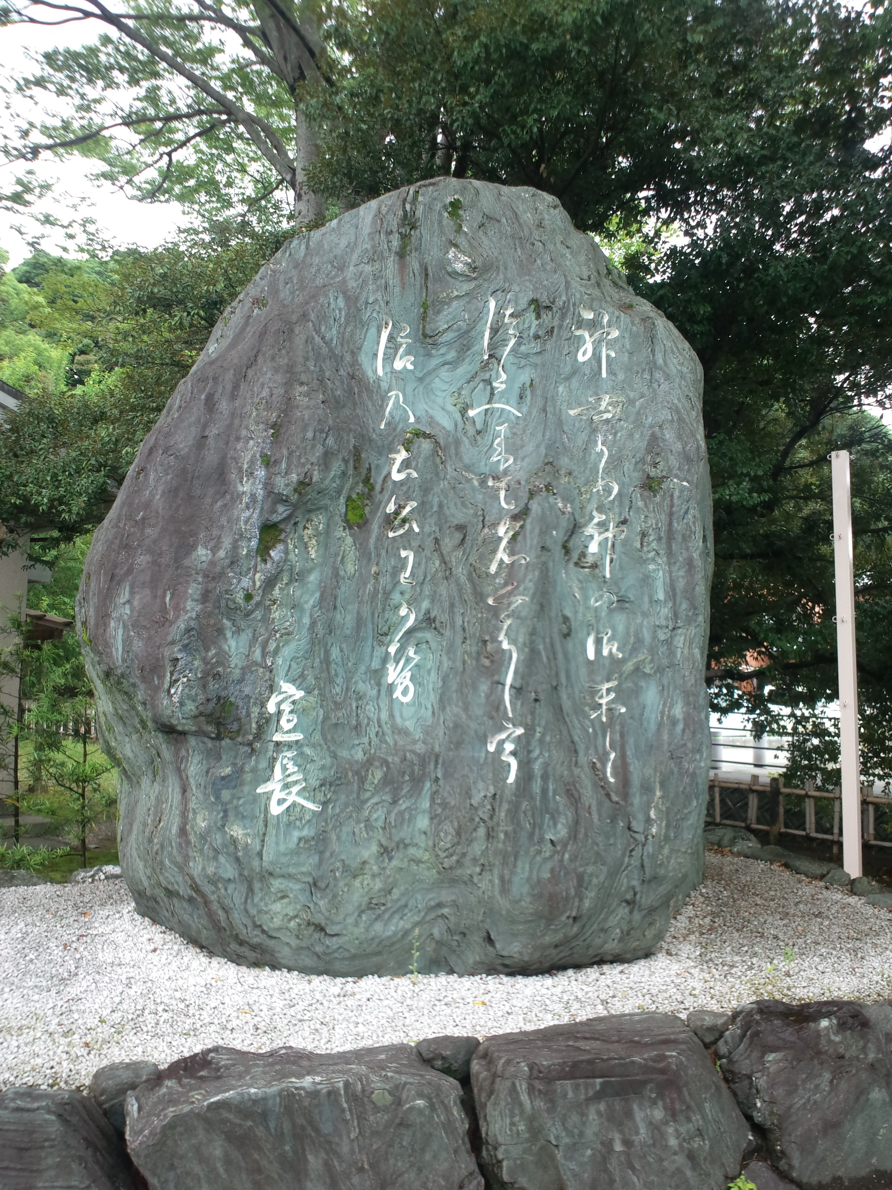 猿田彦神社 - 本居宣長の歌碑 『神世より 神の御末とつたえ来て 名くはし宇治乃土公わが勢』